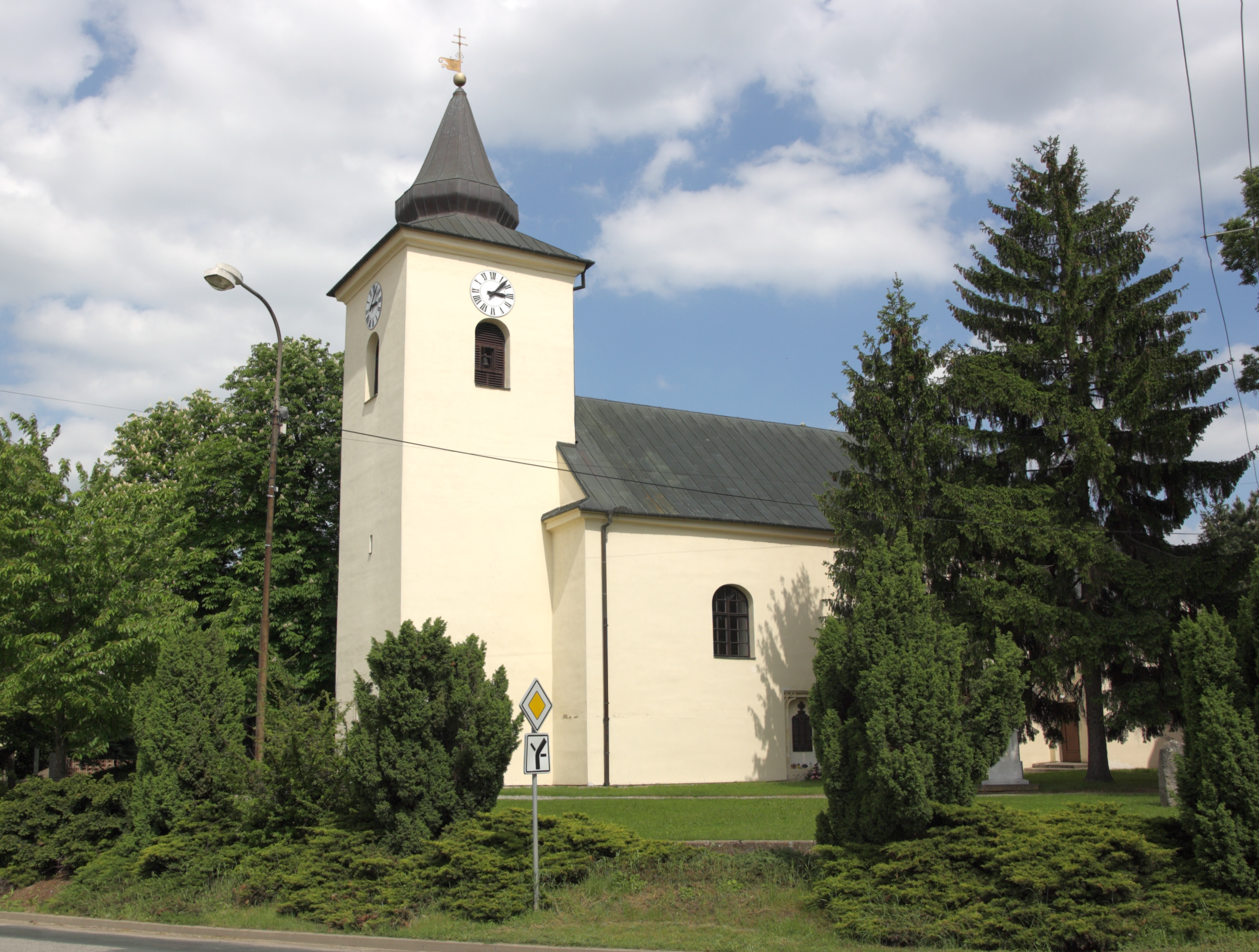 Měnín - kostel svaté Markéty